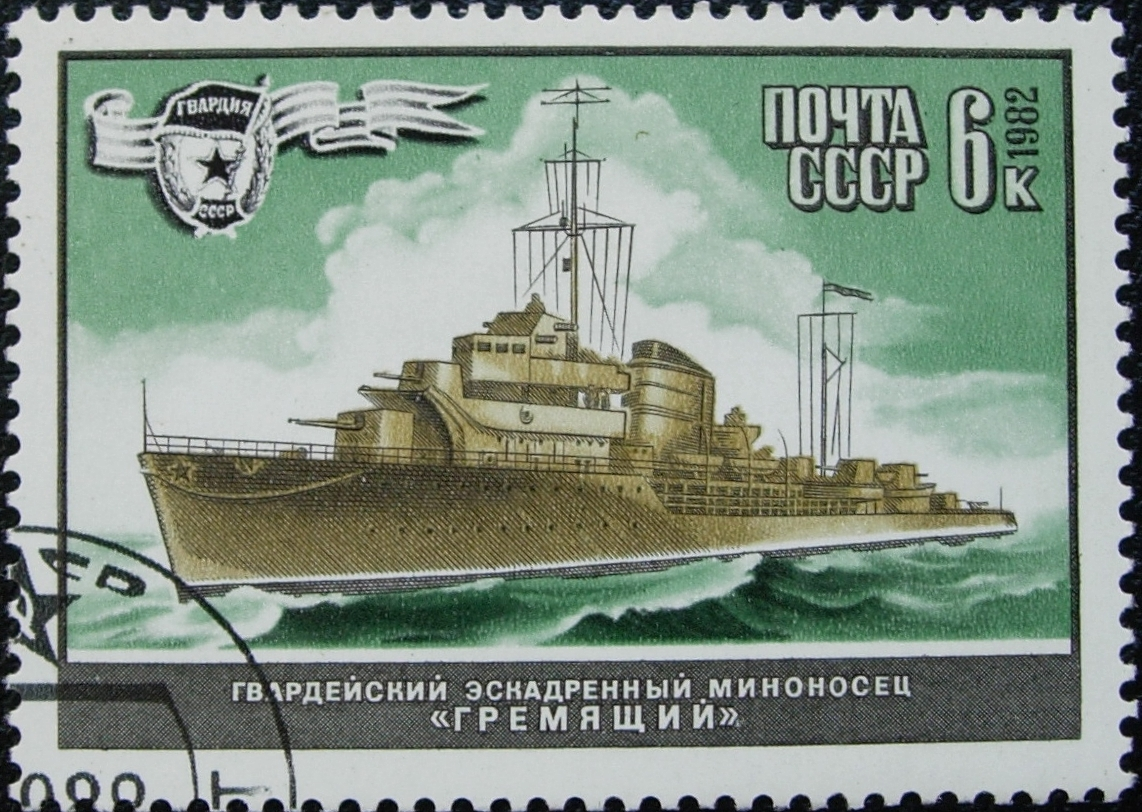 Марка Почты СССР. Гвардейский эскадренный миноносец "Гремящий".